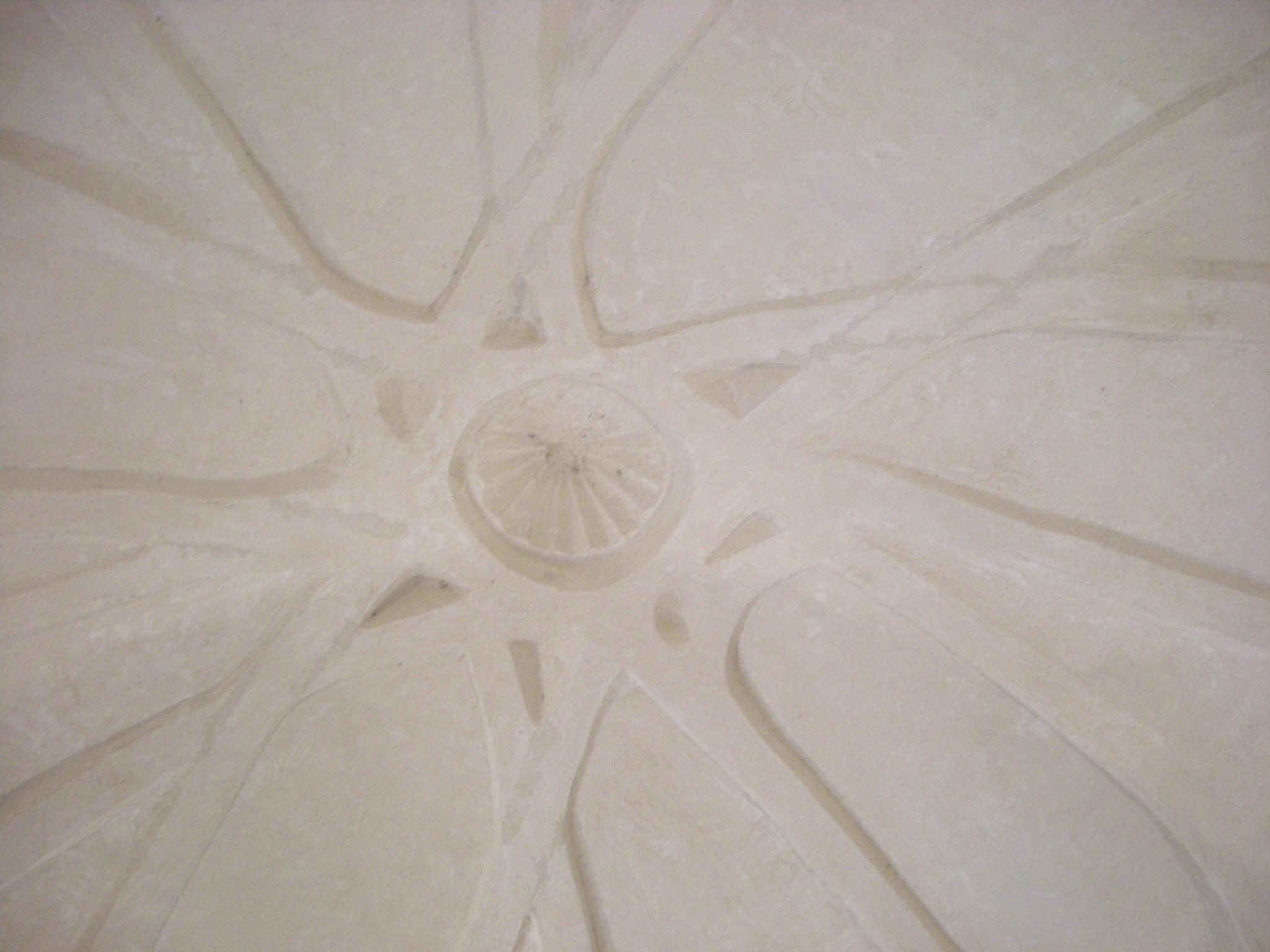 Cúpula almohade del castell de Biar